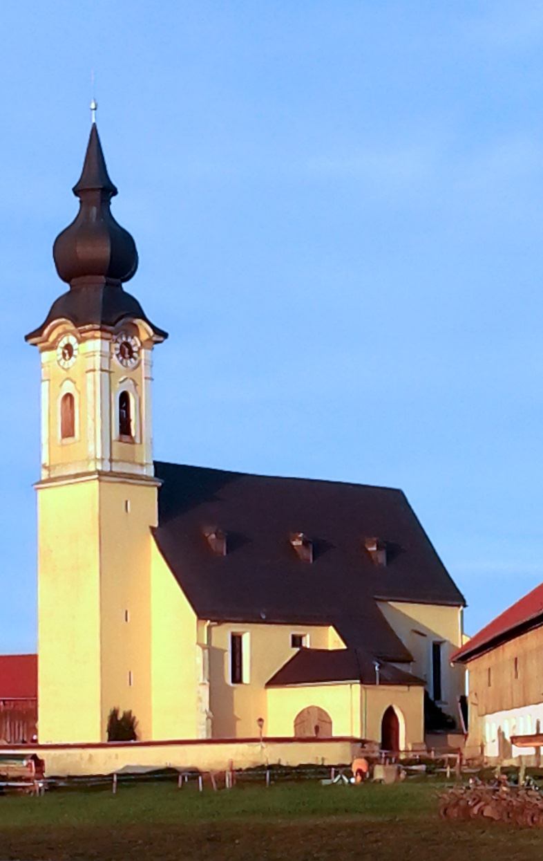 Kirche Maria im Mösl, Arnsdorf, Gemeinde Lamprechtshausen, Land Salzburg.